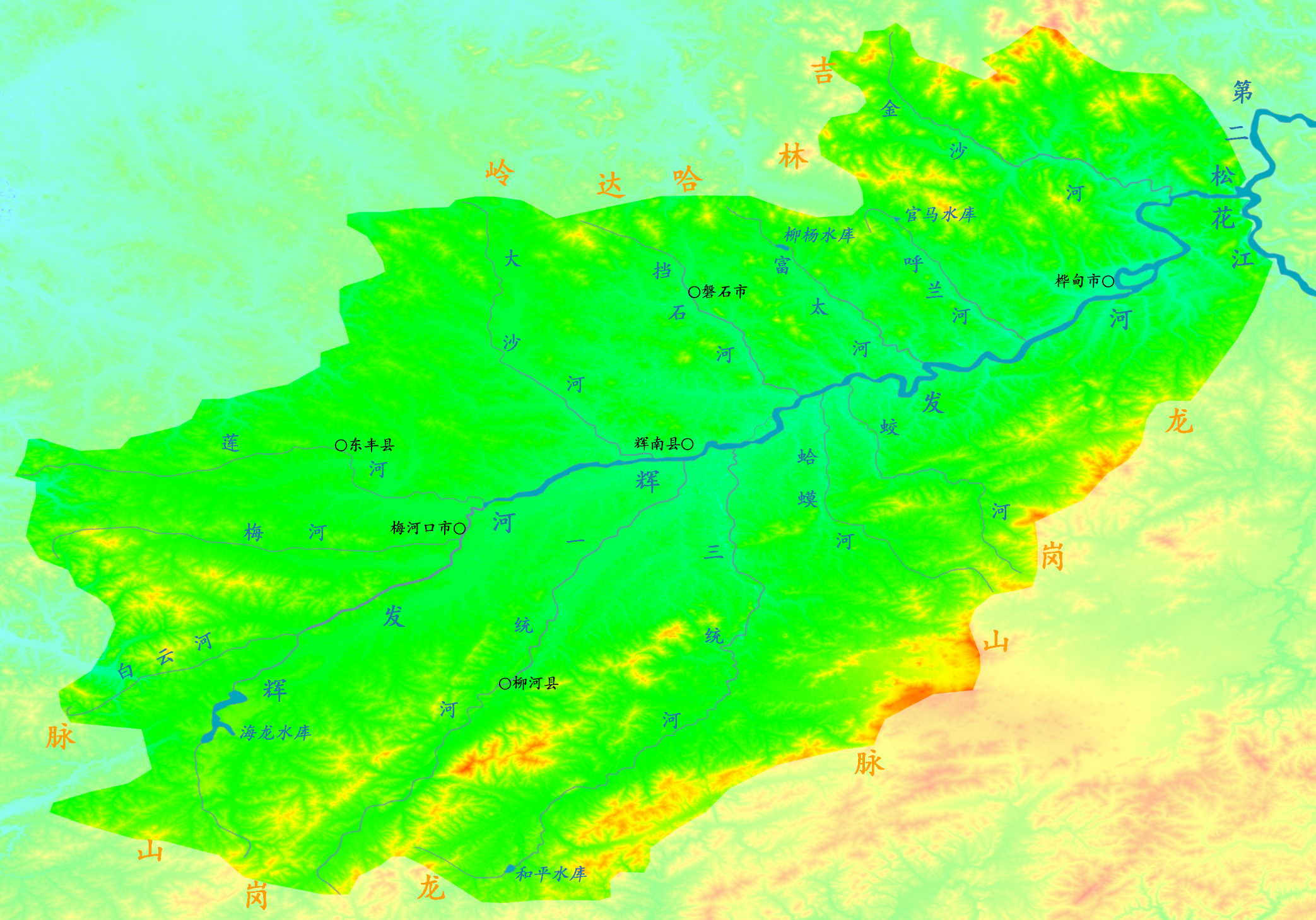 辉发河流域图。根据《中国河湖大典·黑龙江 辽河卷》绘制